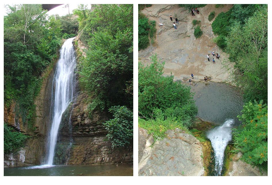 თბილისი / Tbilisi. Botanical Garden